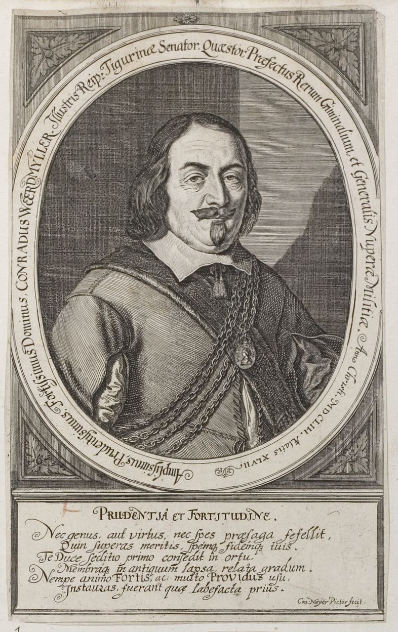 Grafik aus dem Klebeband Nr. 3 der Fürstlich Waldeckschen Hofbibliothek Arolsen Motiv: Hans Konrad Werdmüller (1606–1674)